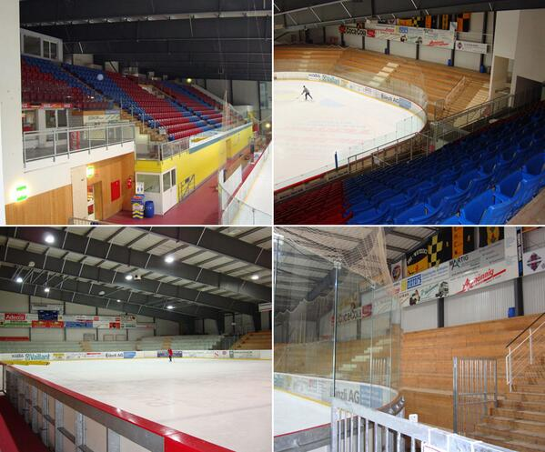 KEB Wetzikon